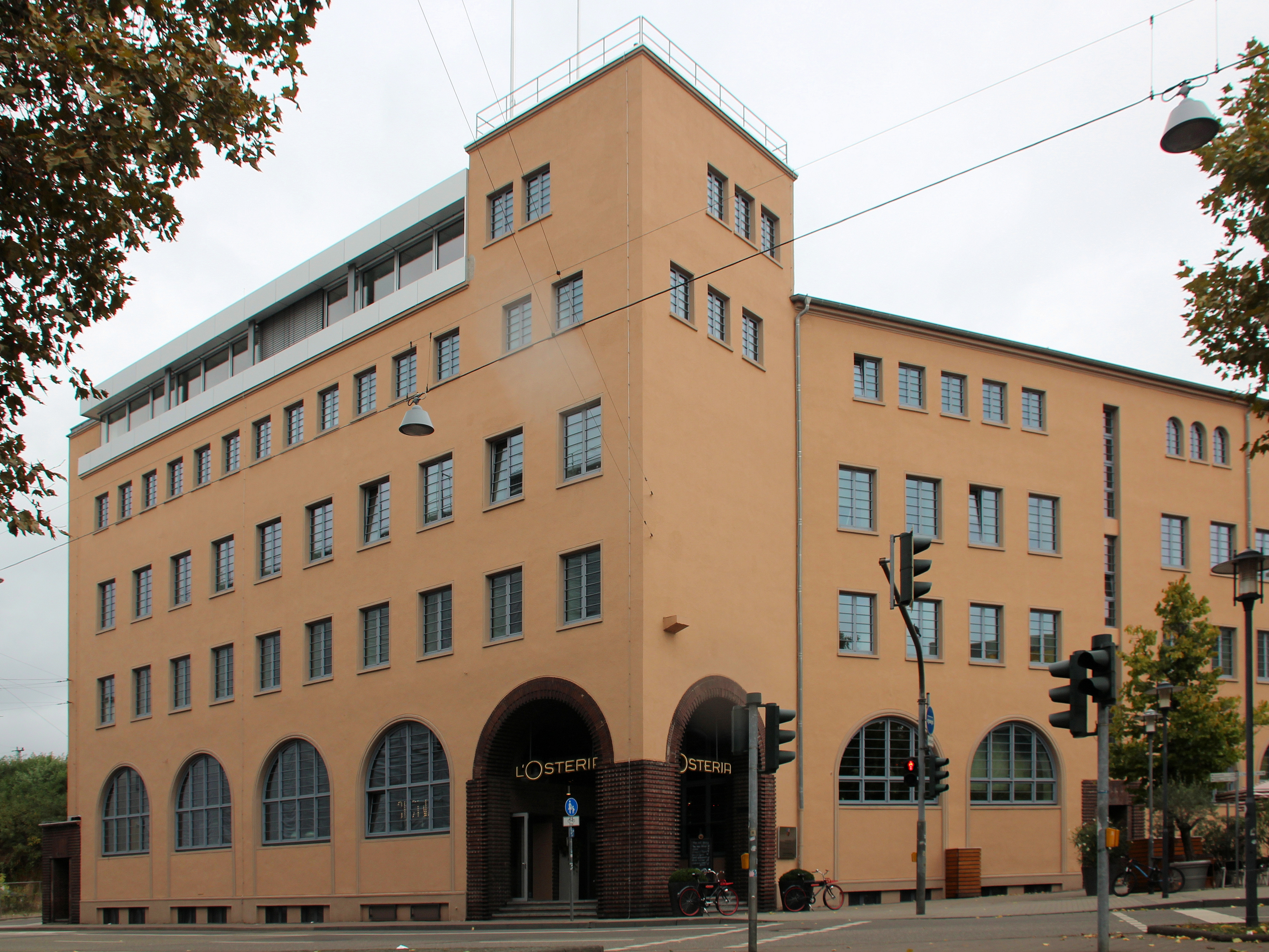 Ehemaliges Hauptpostamt in Saarbrücken-St. Johann, Trierer Straße 31 / St. Johanner Straße; erbaut 1928-1929 nach Entwurf des Saarbrücker Architekten Ludwig Nobis; Fassaden trotz erheblicher Detail-Verluste unter Denkmalschutz